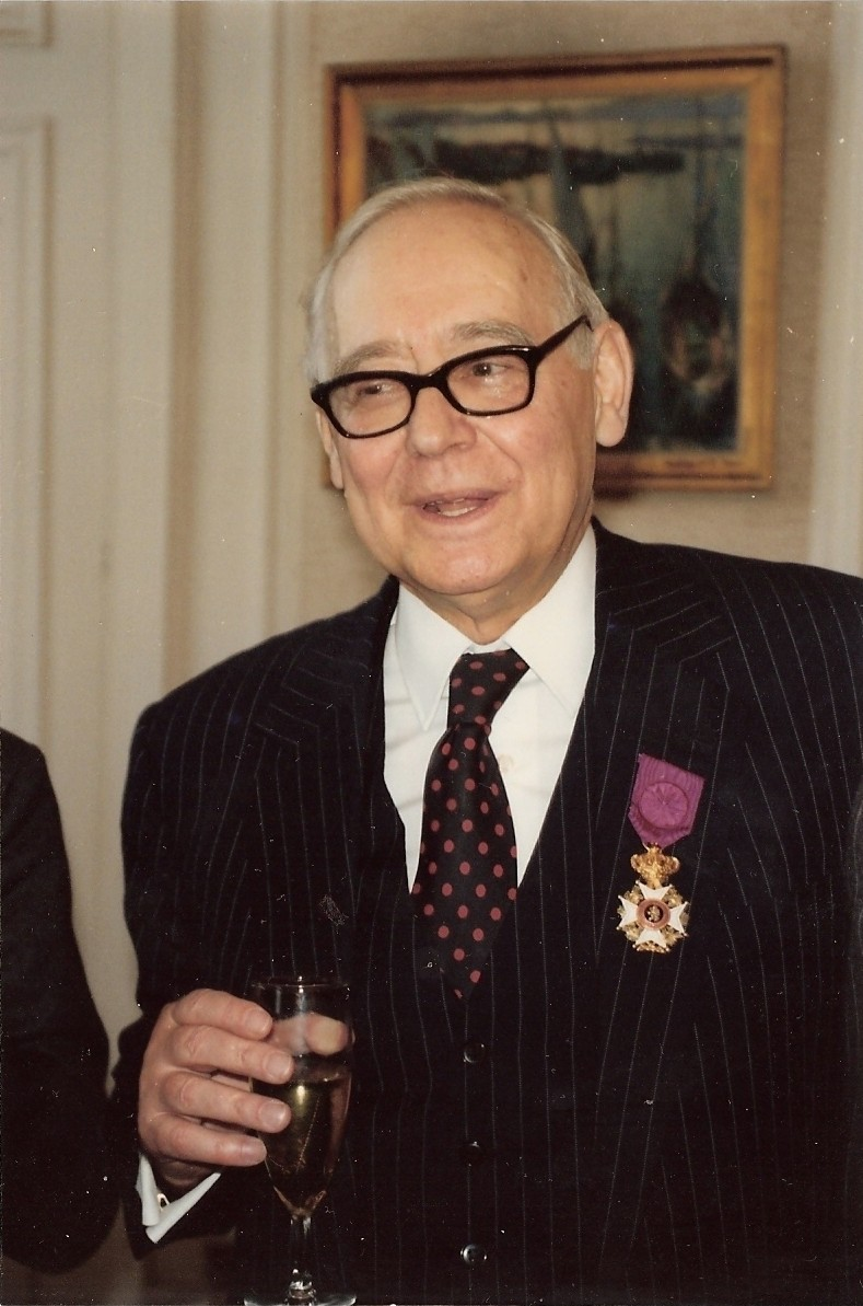 Alexis Guedroitz Officier de l'Ordre de Léopold